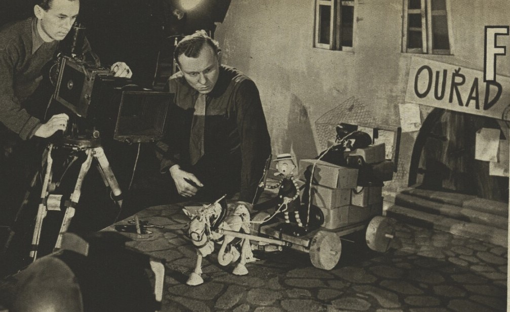 Karel Zeman (1947, film Pan Prokouk ouřaduje)